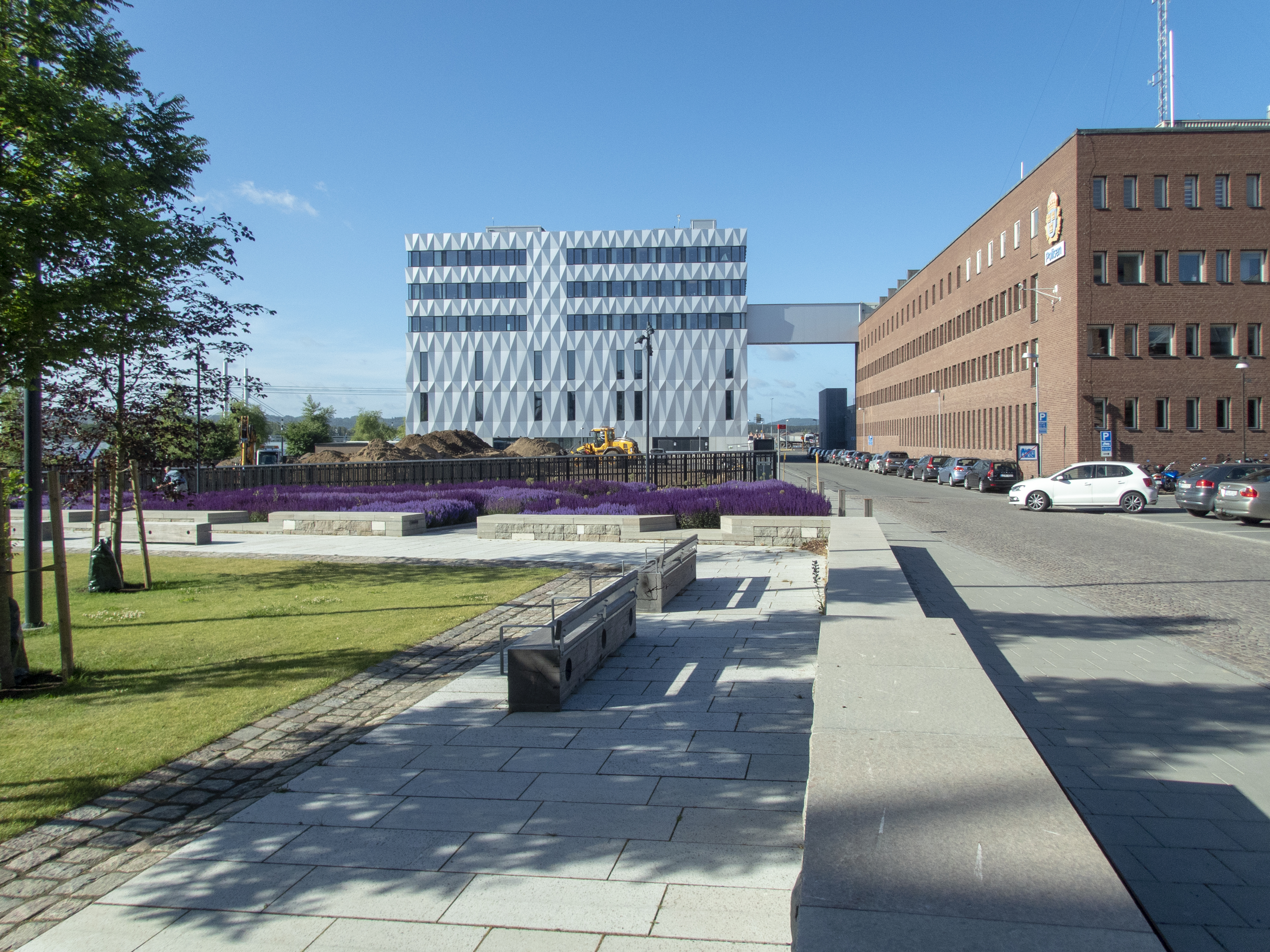 Rättscentrum, Jönköping